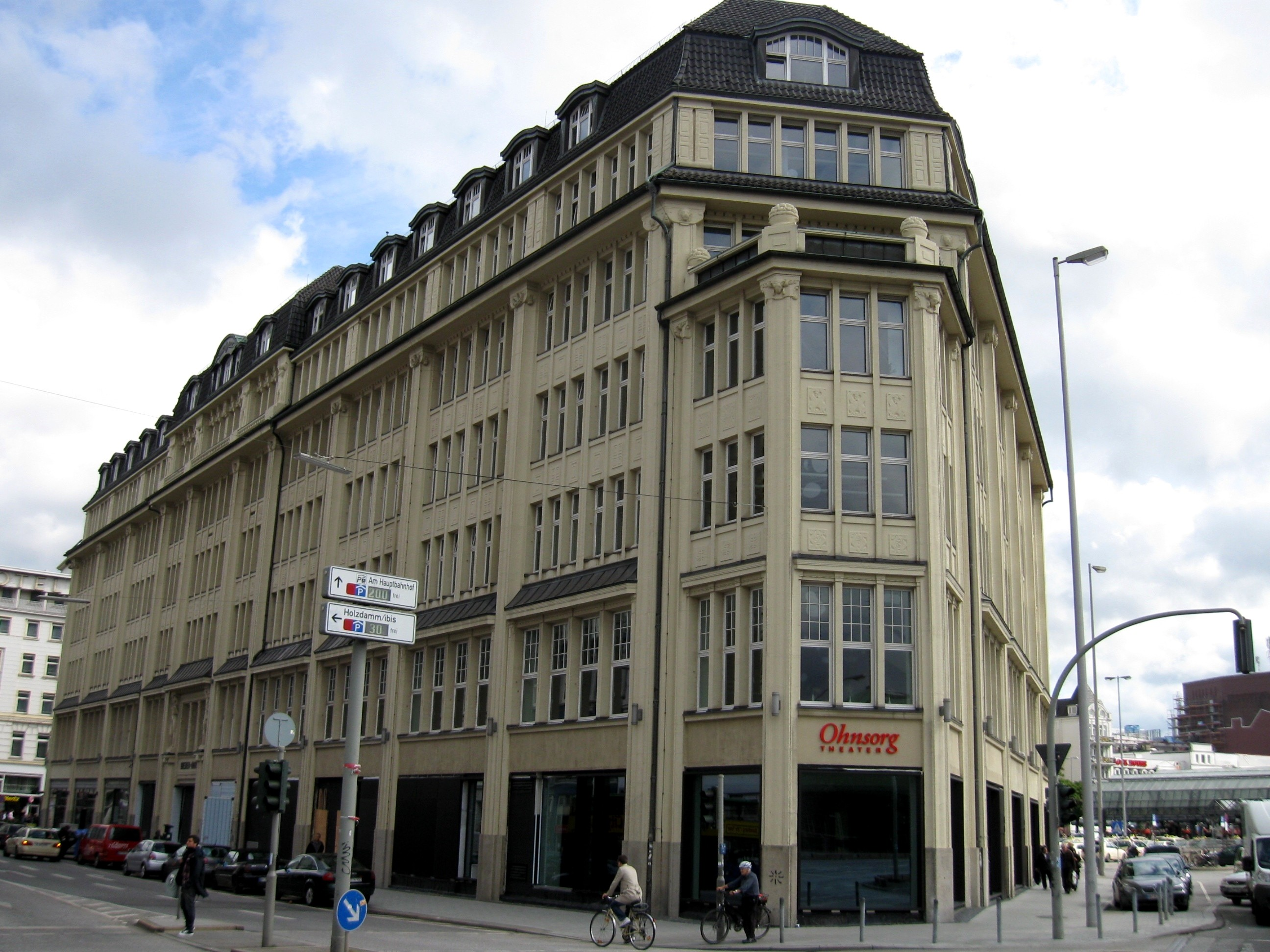 Neuer Spielort des Ohnsorg-TheatersThis is a photograph of an architectural monument.